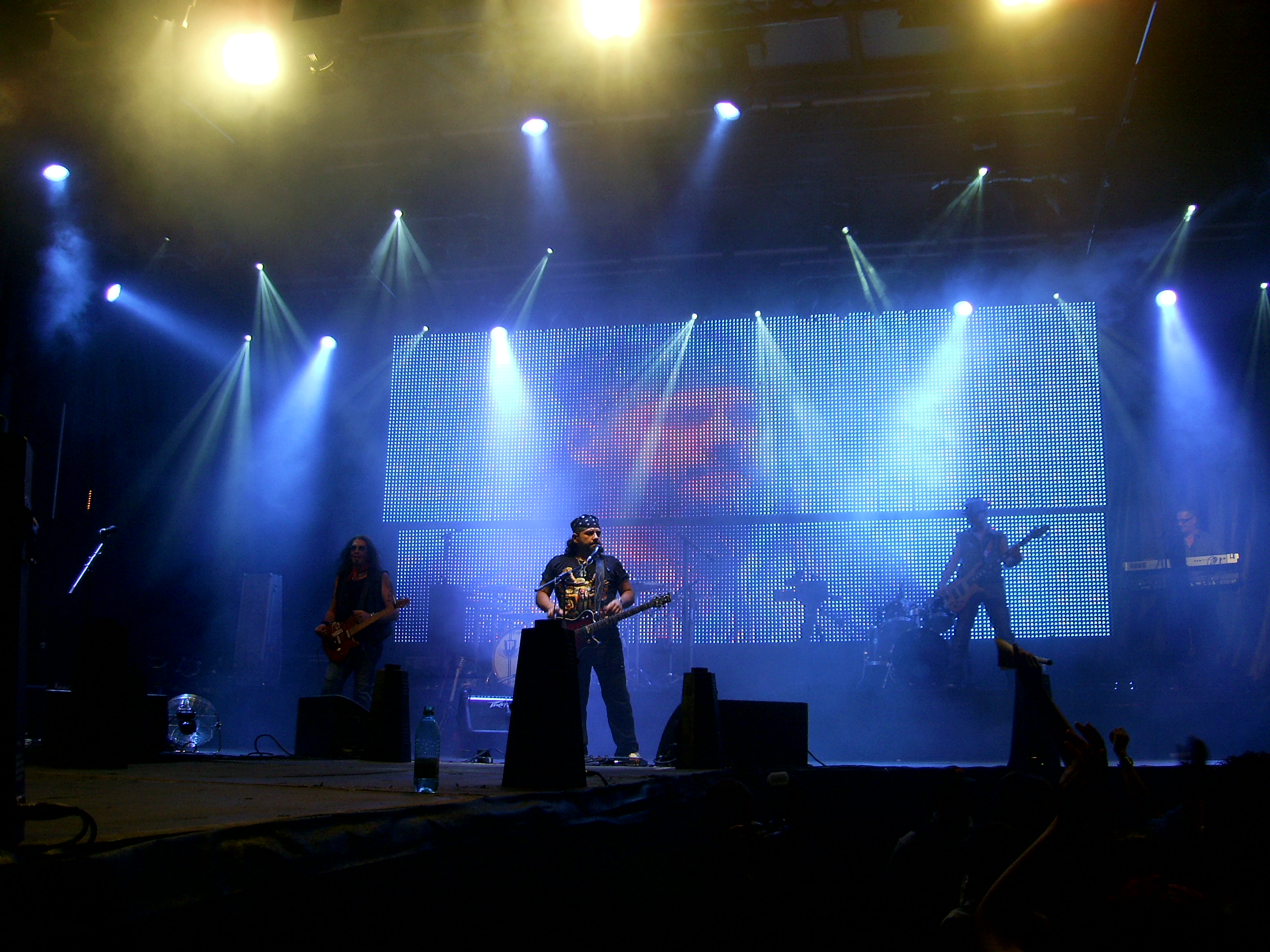 Trupa Cargo la Bacau in 2011 cu ocazia Serbarilor Timisoreana